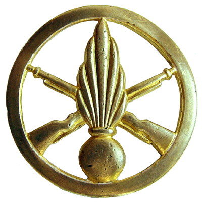 Insigne de béret de l'infanterie française.